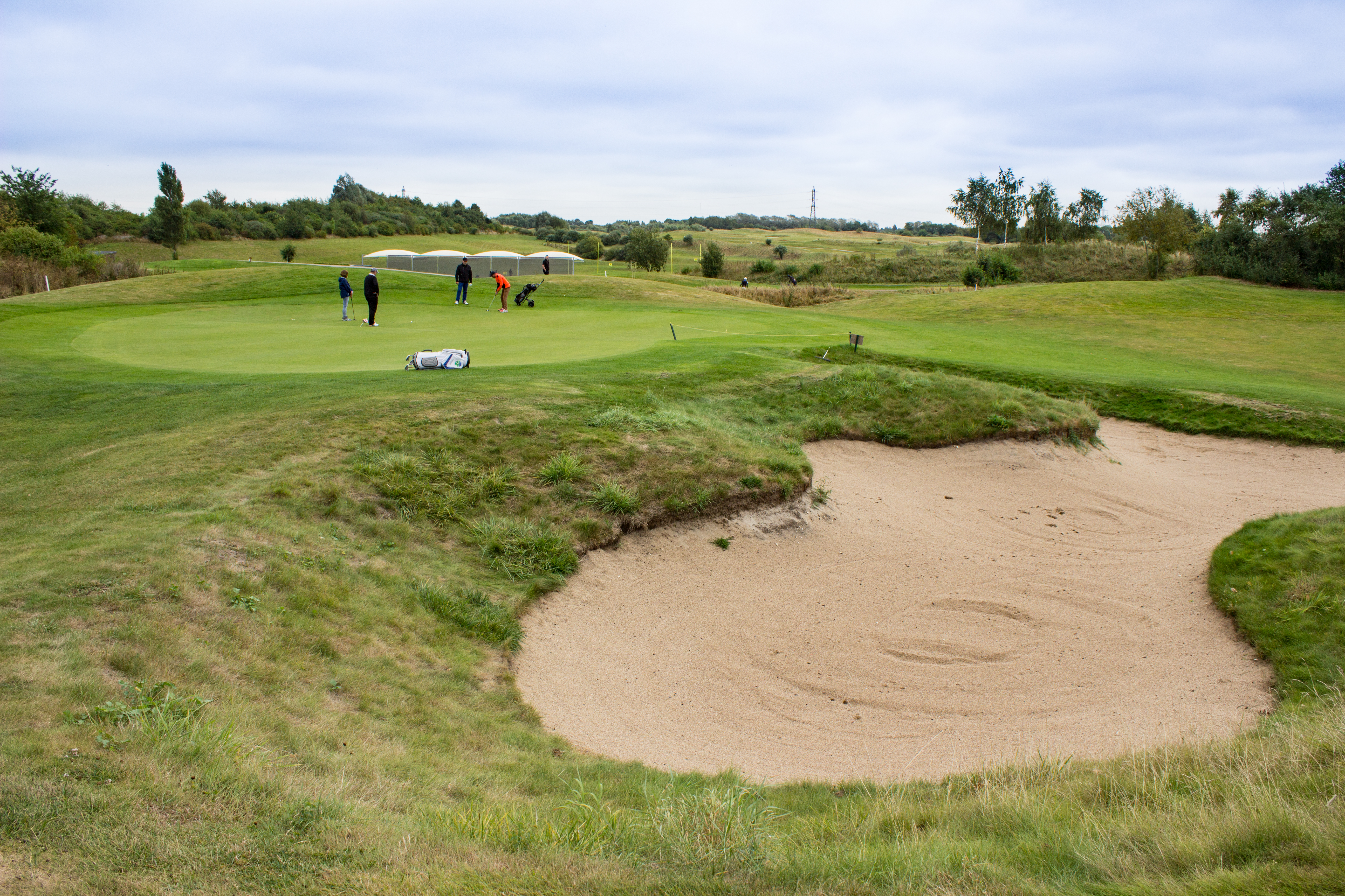 9 trous du golf de Ronchin(Lille)